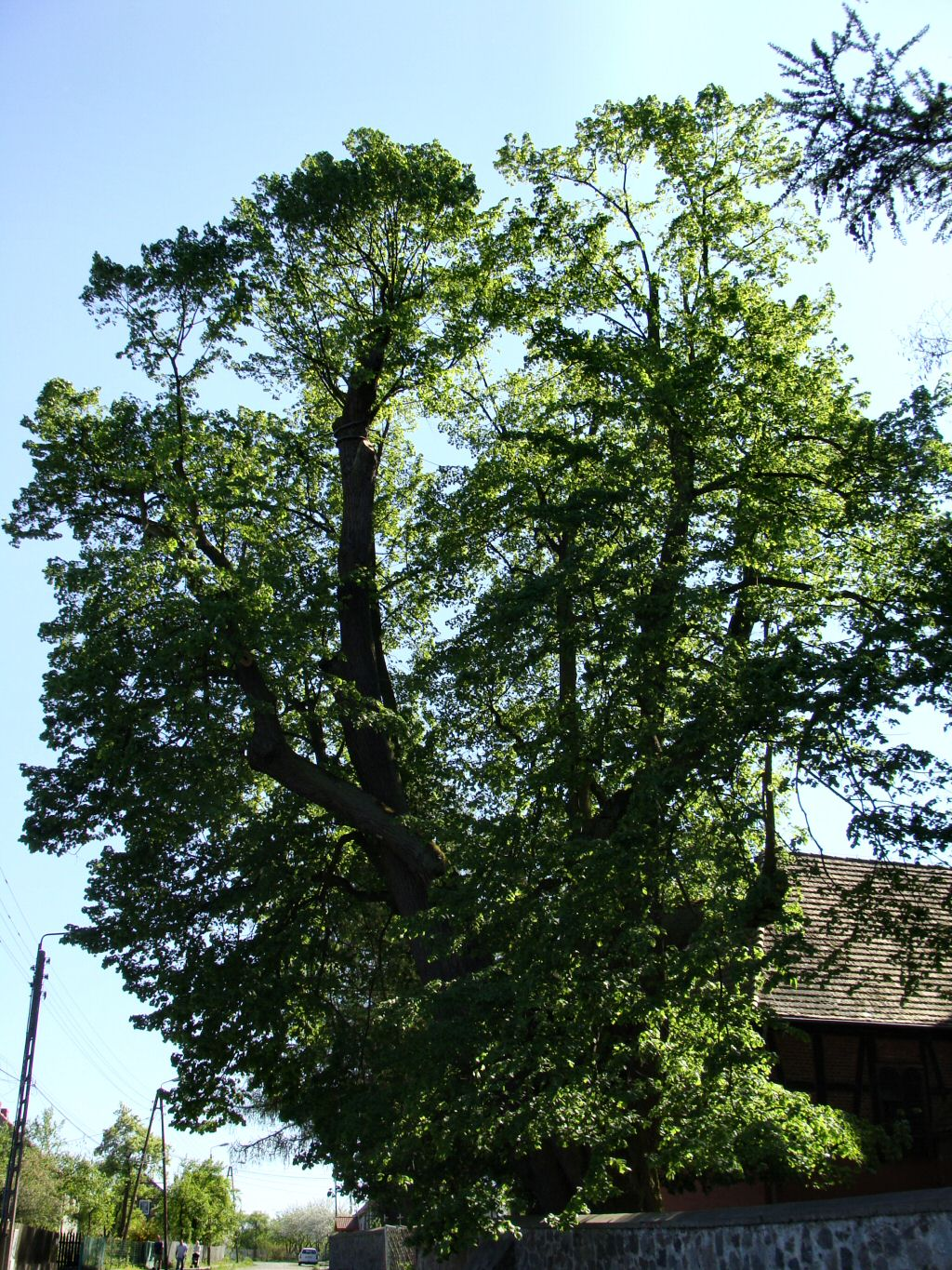 Lipa św. Ottona w Szczecinie Płoni (ul. Klonowa)